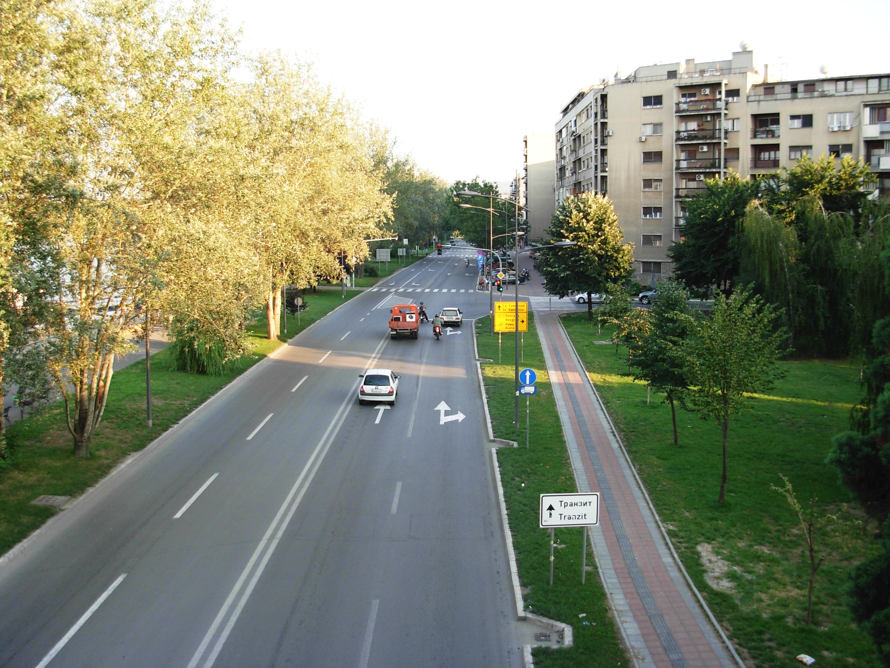 Beogradski kej, pogled sa mosta Varadinska Duga